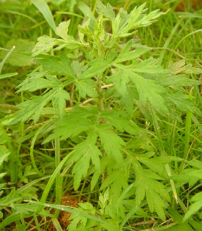 艾草，竹围墙自拍。